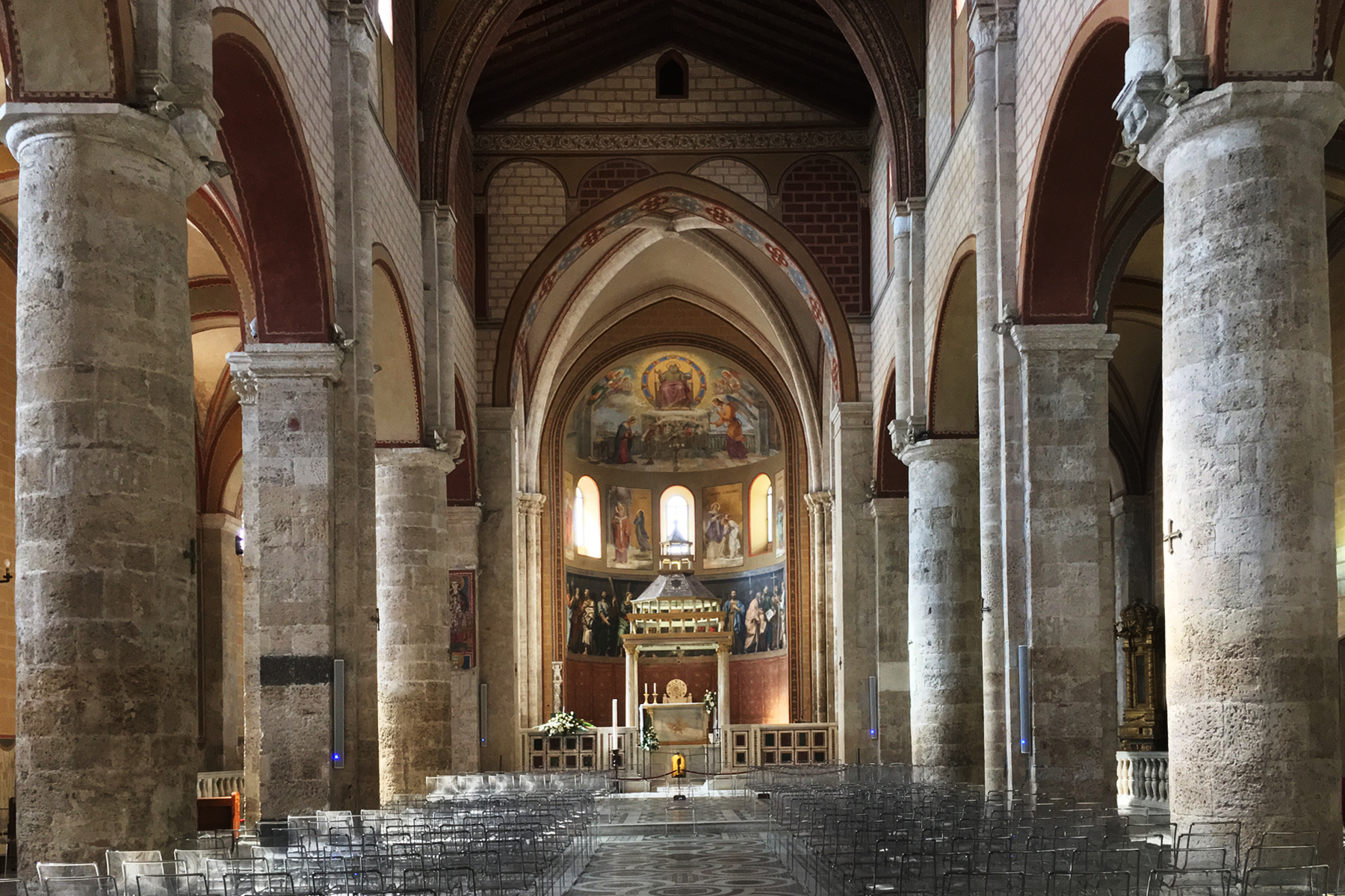 Cattedrale di Santa Maria This is a photo of a monument which is part of cultural heritage of Italy.